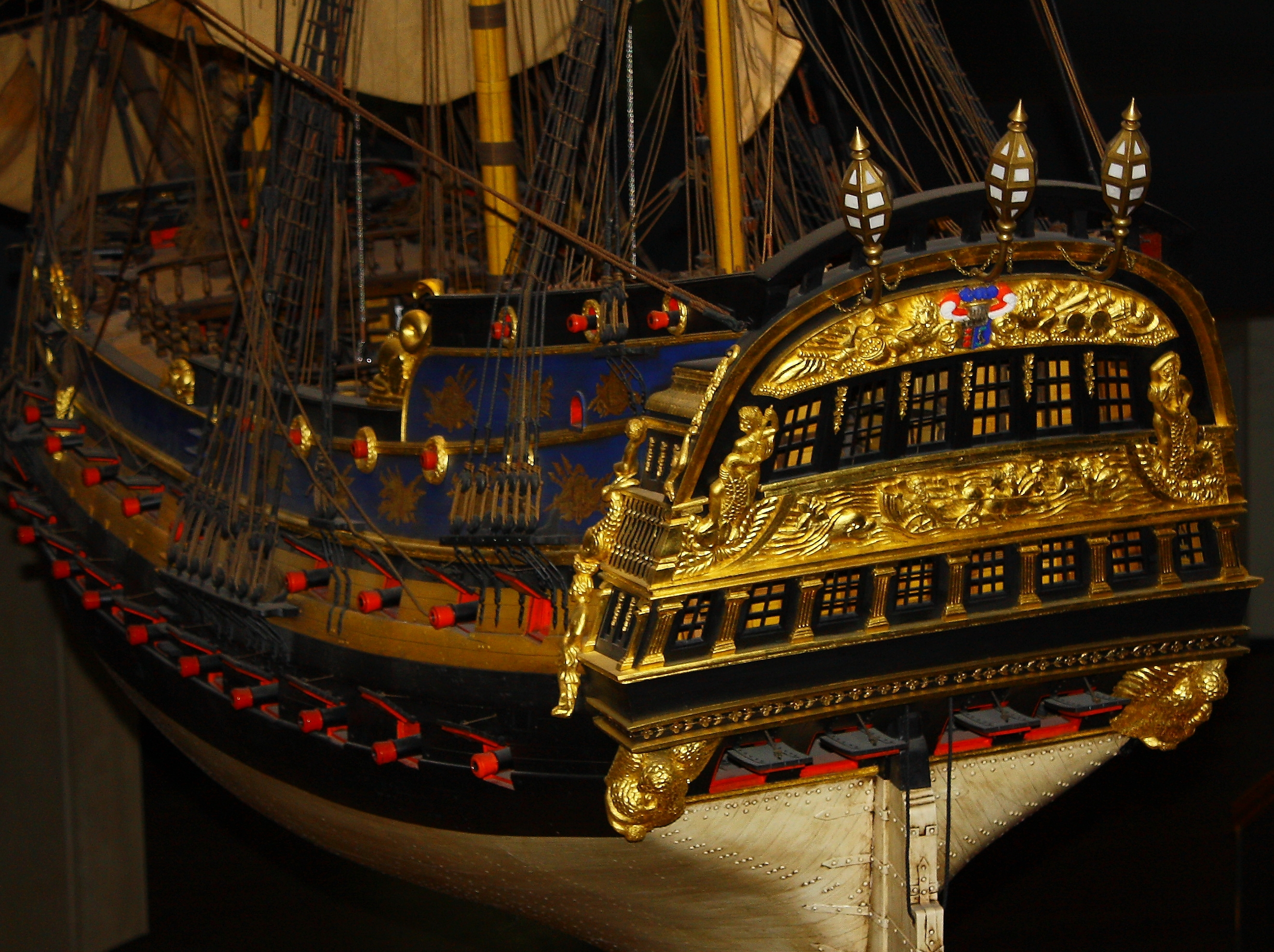 Detailansicht des Heckspiegels der Wapen von Hamburg (III)